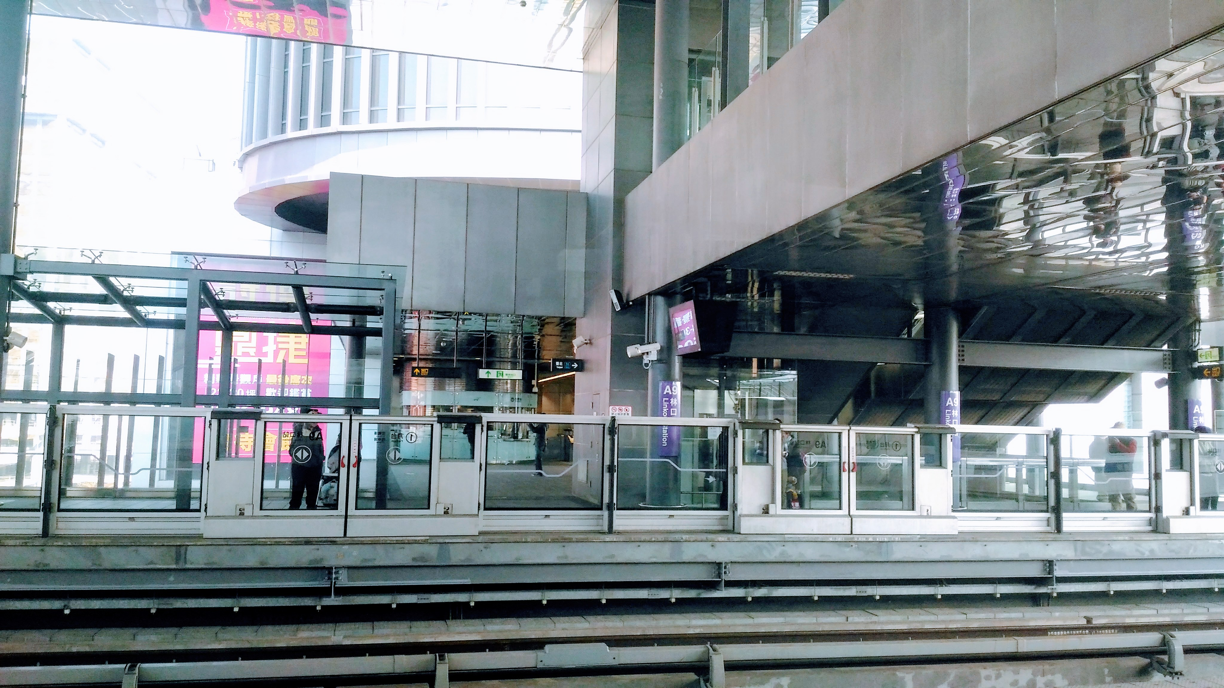 中文（台灣）: 桃園捷運林口站第一月台。